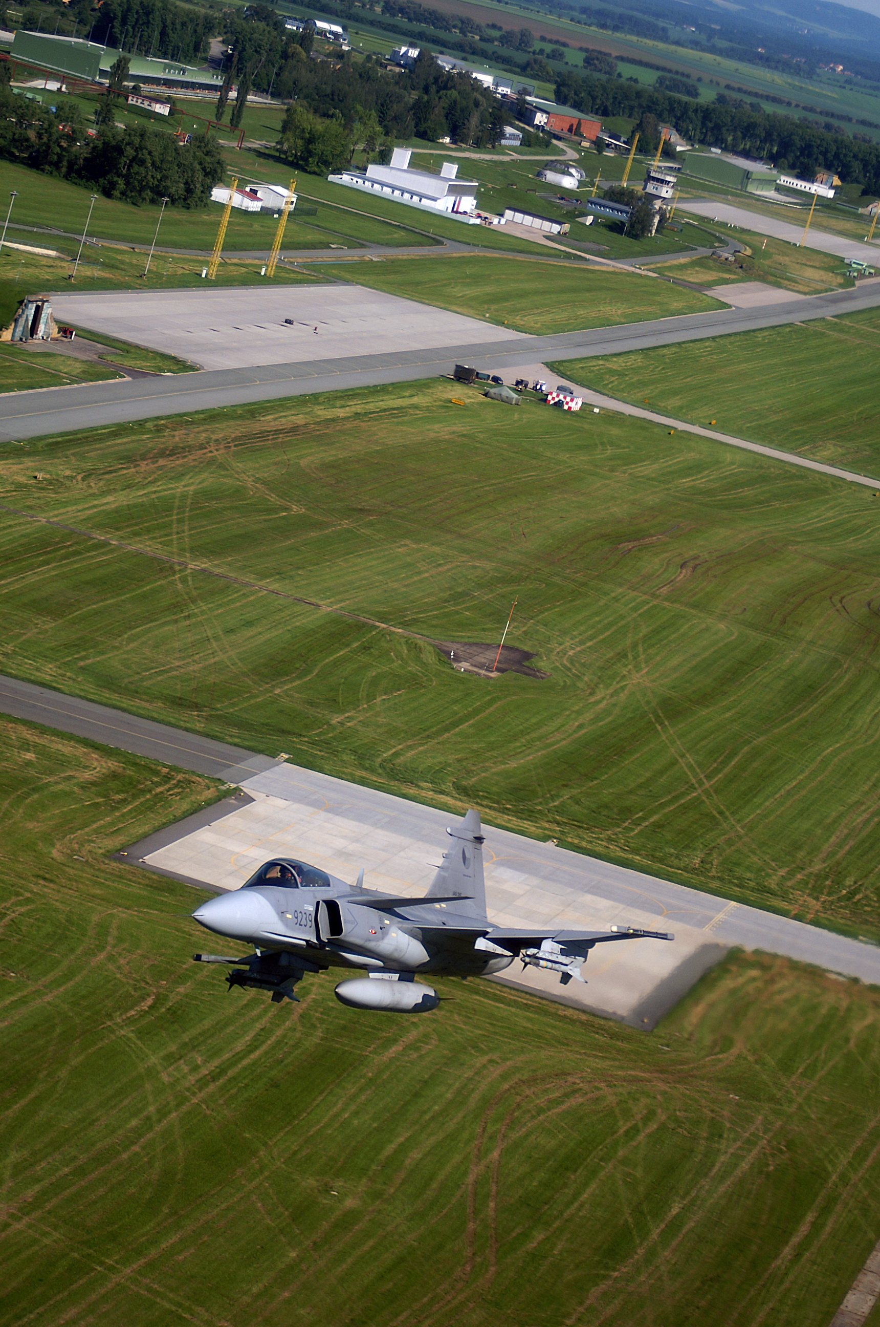 Saab JAS-39 Gripen (Czech Air Force)